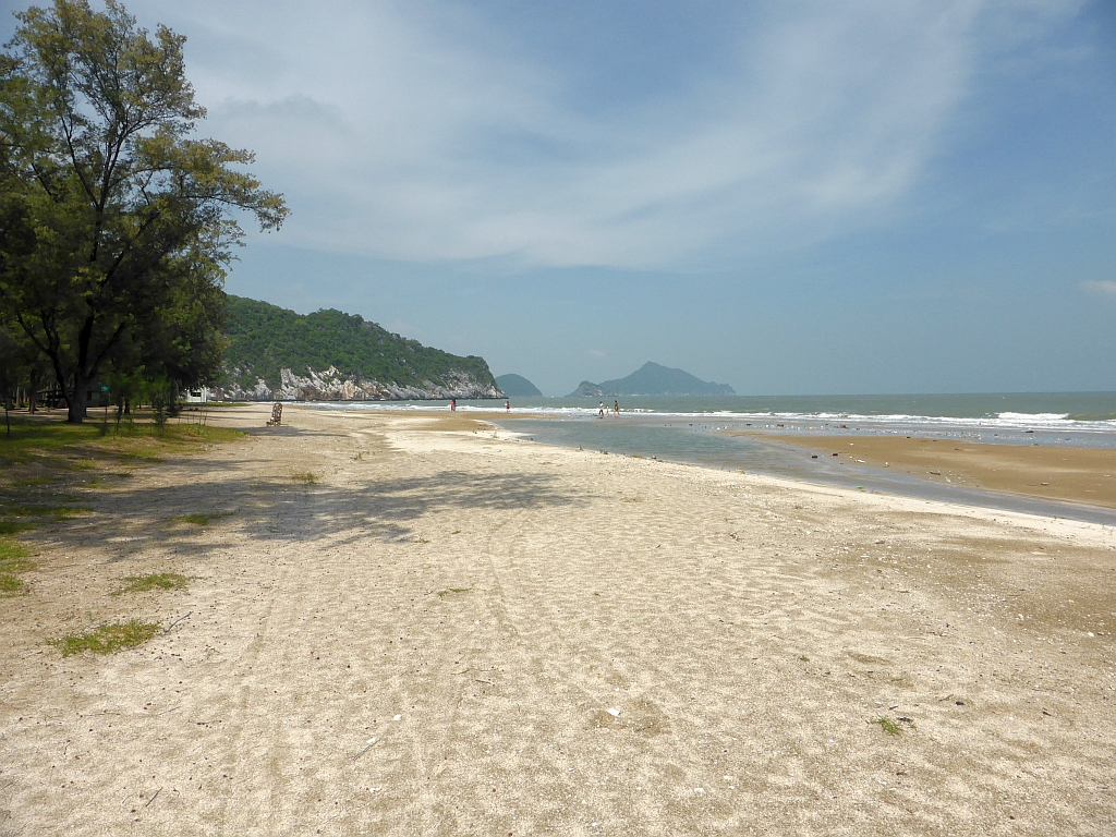 Phraya-Nakhon-Höhle, 4.11.2015